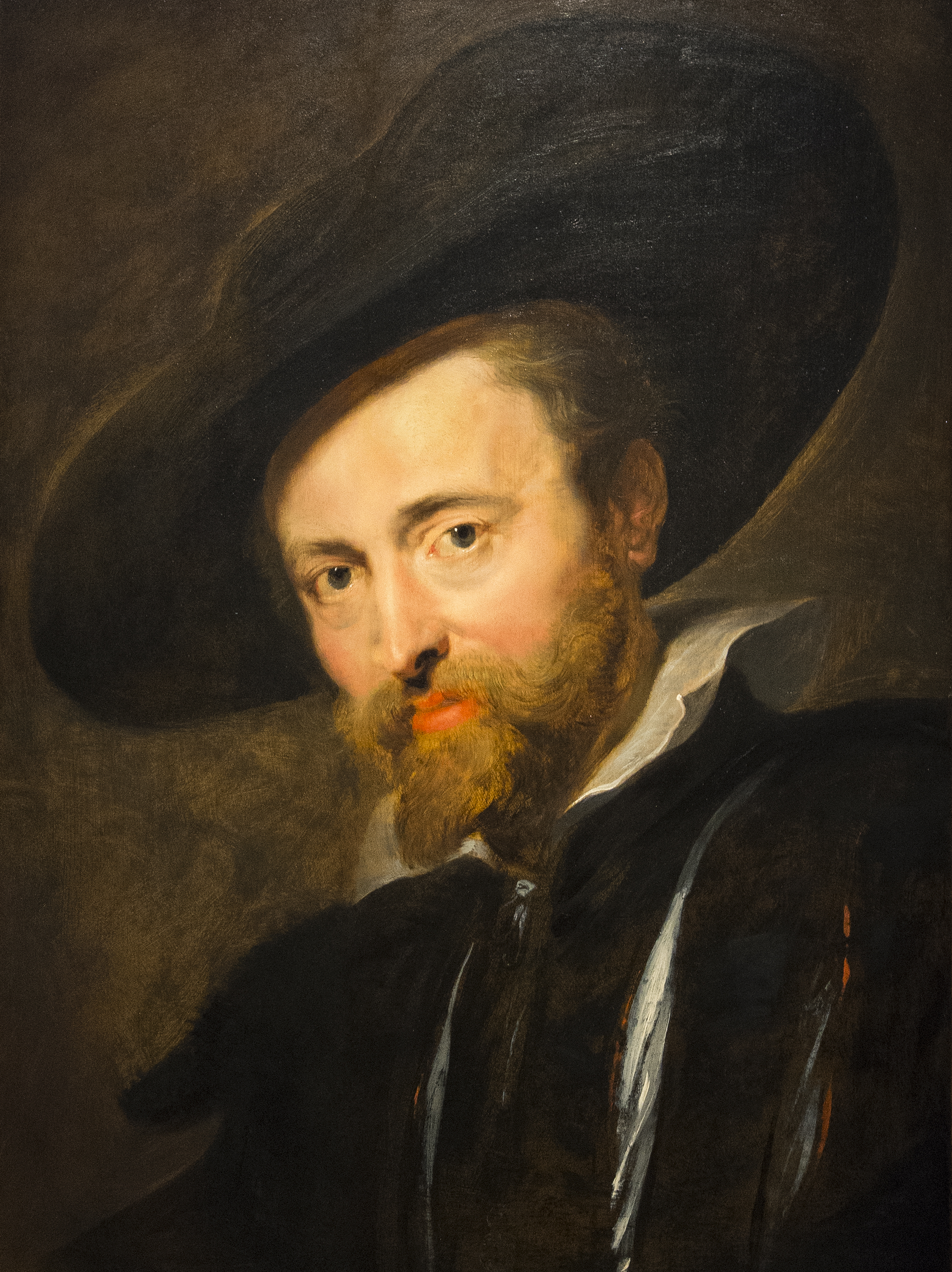 Peter Paul Rubens (1577-1640) Zelfportret - Rubenshuis Antwerpen 27-09-2021 This photo of movable heritage has been taken in the Flemish Region